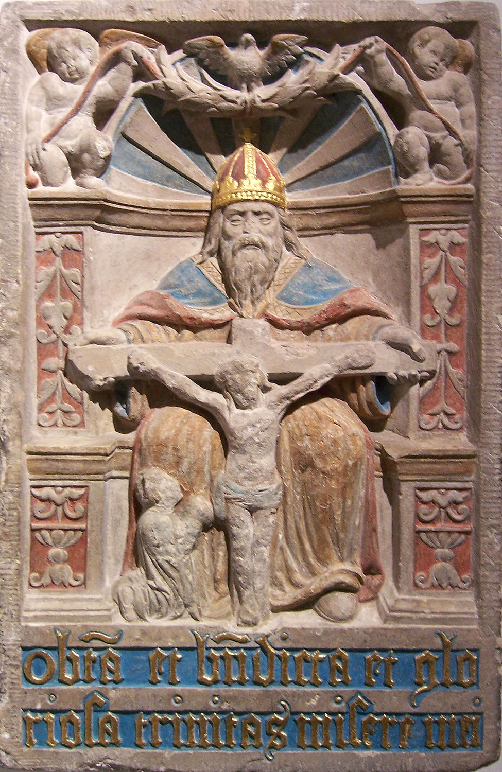 Bremer Dom-Museum: Epitaph für Domvikar Henricus Borcherdi, 1549, Darstellung der Dreieinigkeit in Form des Gnadenstuhls: Gottvater hält den gekreuzigten Christus, darüber der Heilige Geist in Gestalt einer Taube